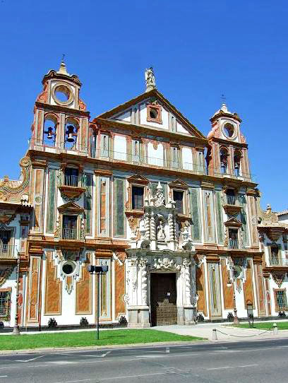 Palacio de la Merced, en Córdoba (España).